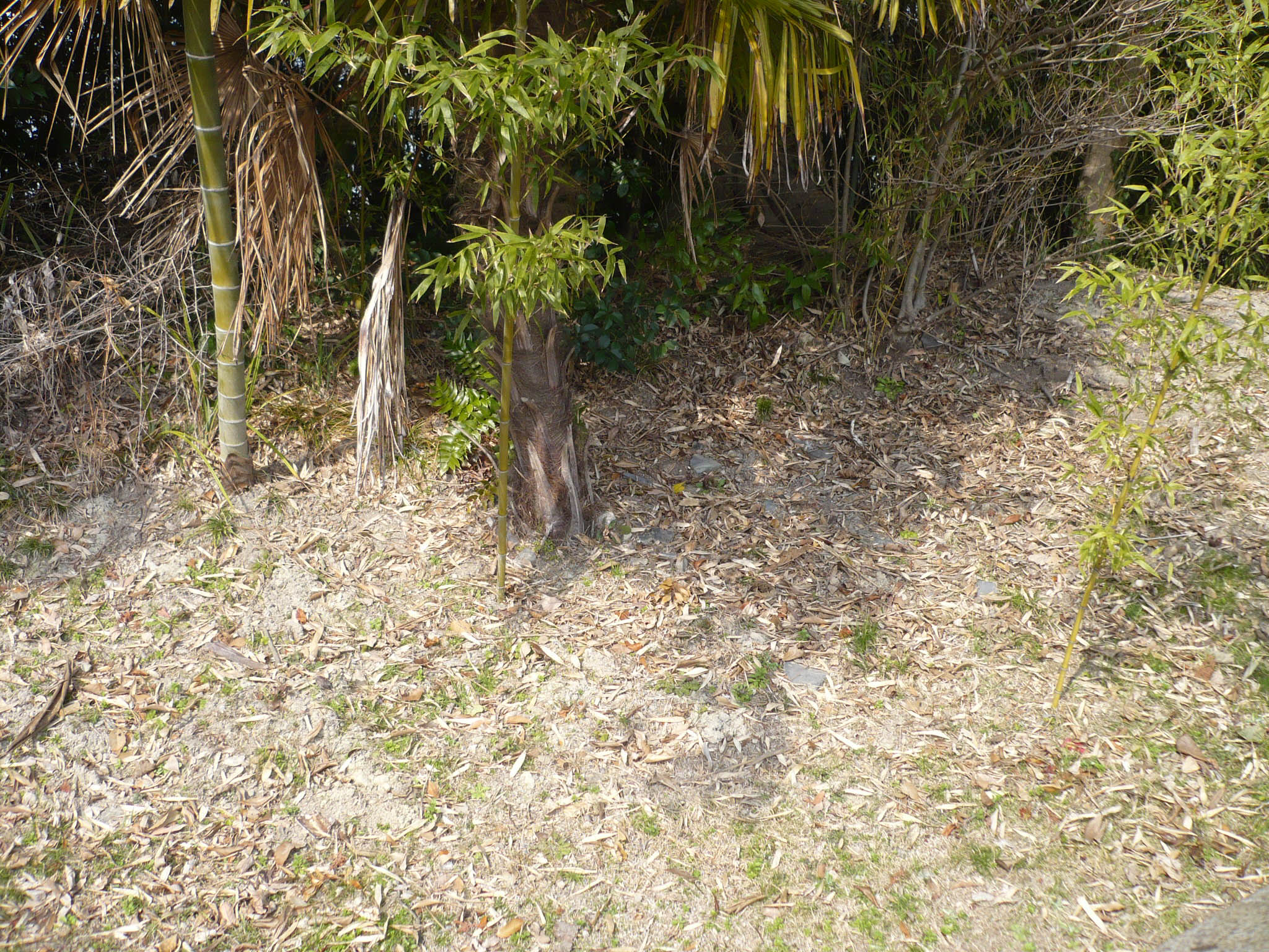 土塁跡